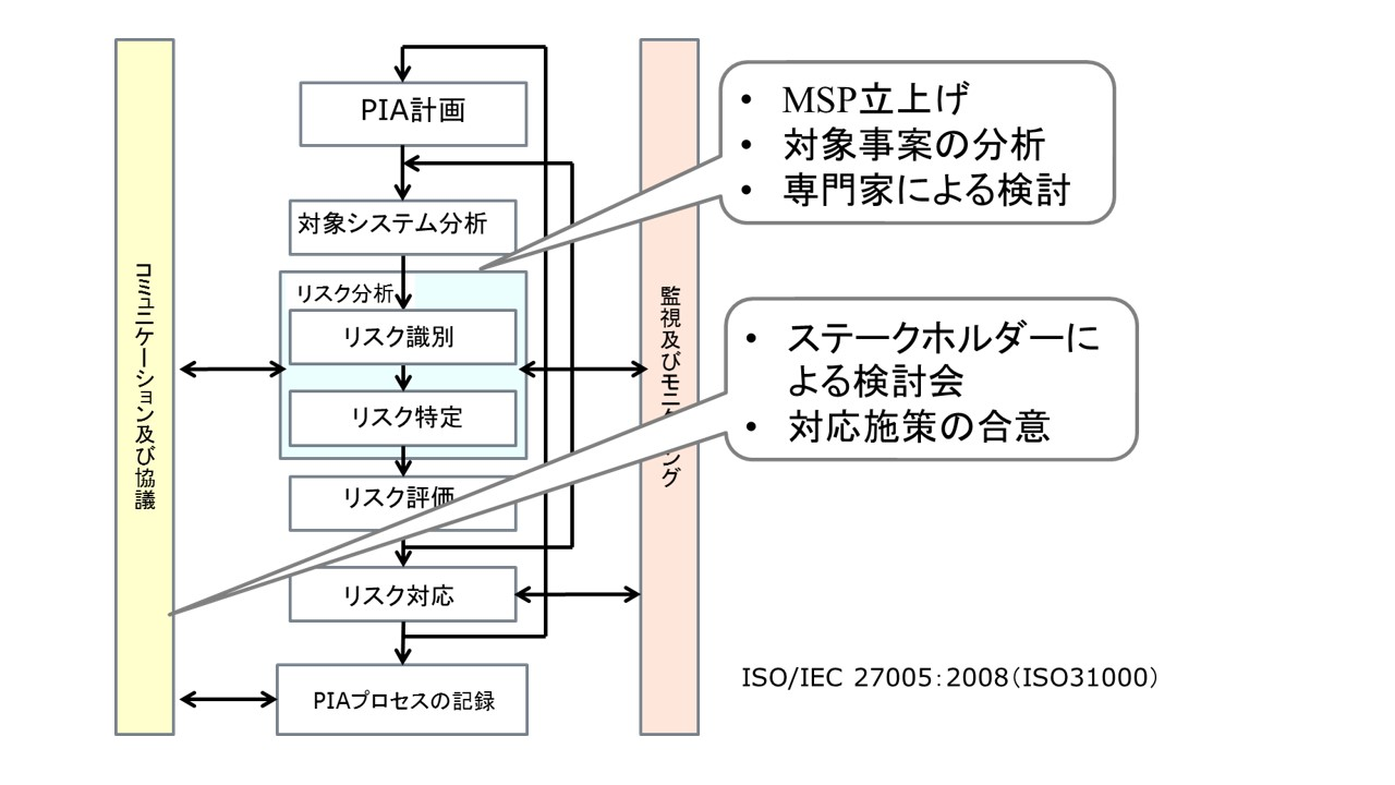 プライバシー影響評価とマルチステークホルダー・プロセスにおけるプロセスの関係